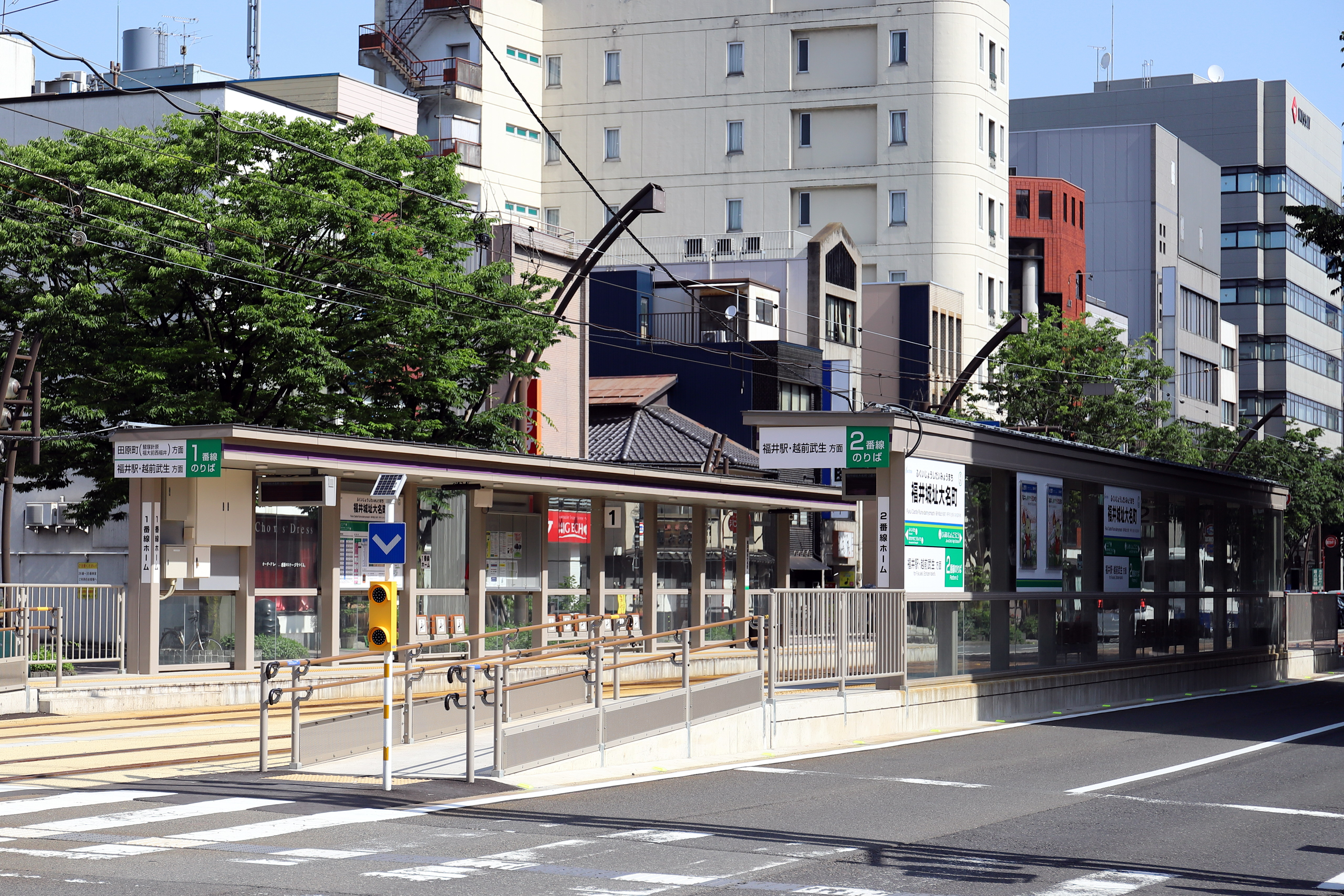 福井城址大名町駅